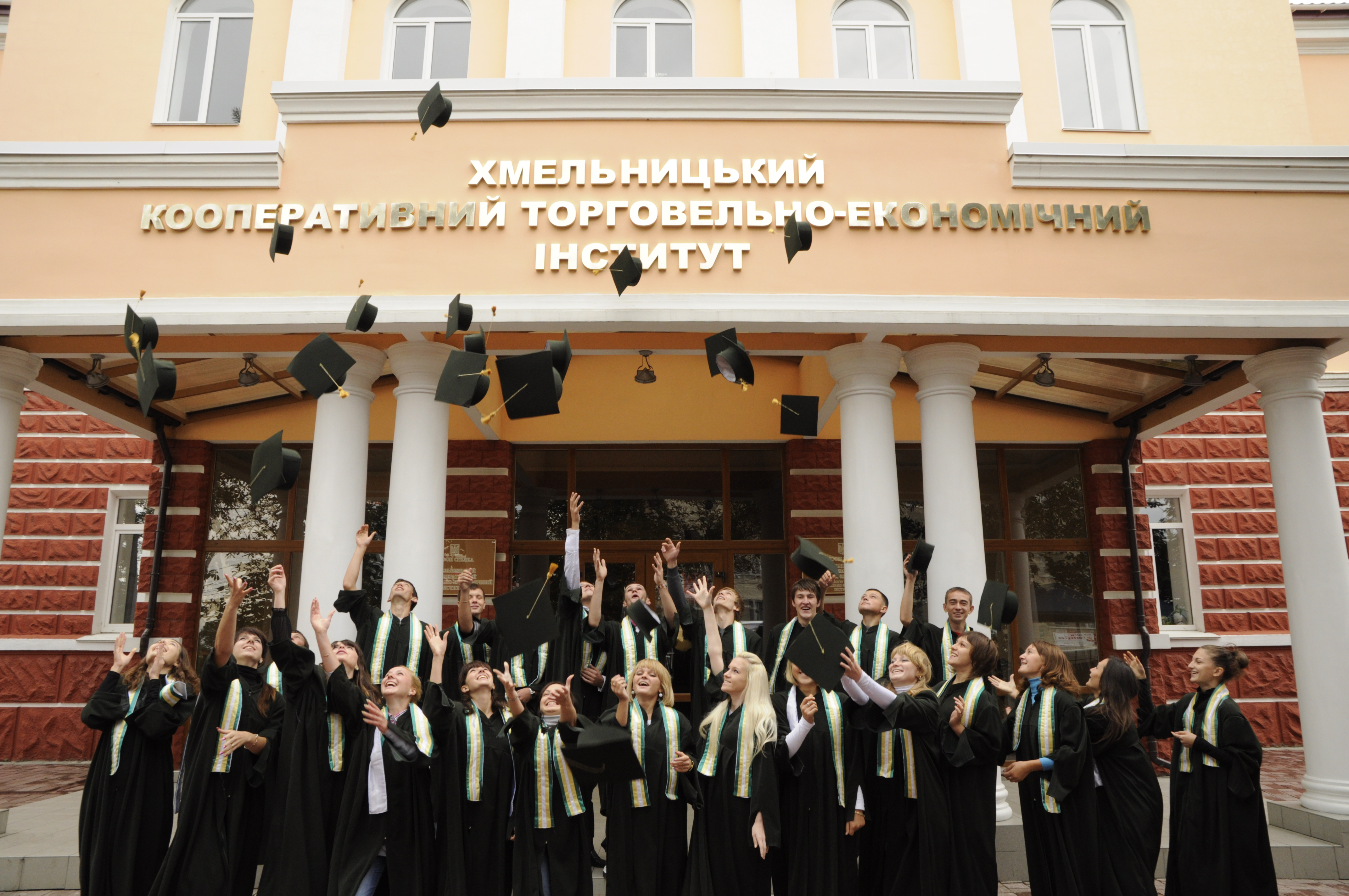 Після випускових урочистостей: магістратура ХКТЕІ